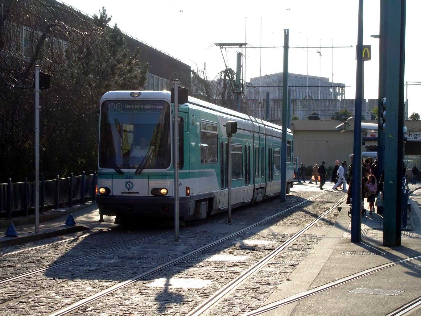 Station de la ligne 1 du tramway parisien Pablo-Picasso à Bobigny (Seine-Saint-Denis), France